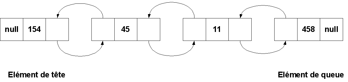 Liste doublement chaînée Origine : Je suis le créateur